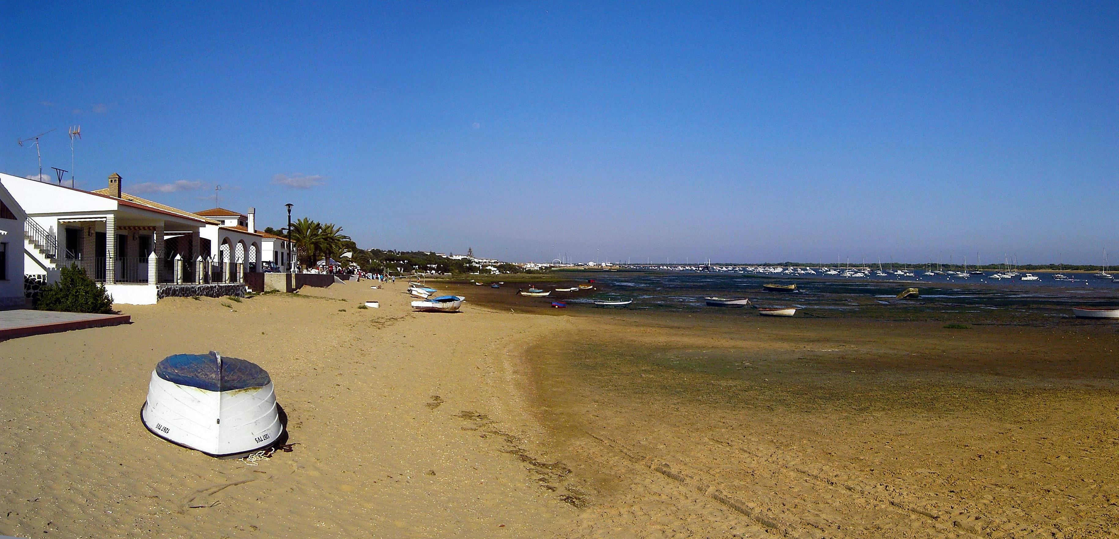 Barcos en la orilla del Río Piedras. El Rompido, Cartaya (Huelva)